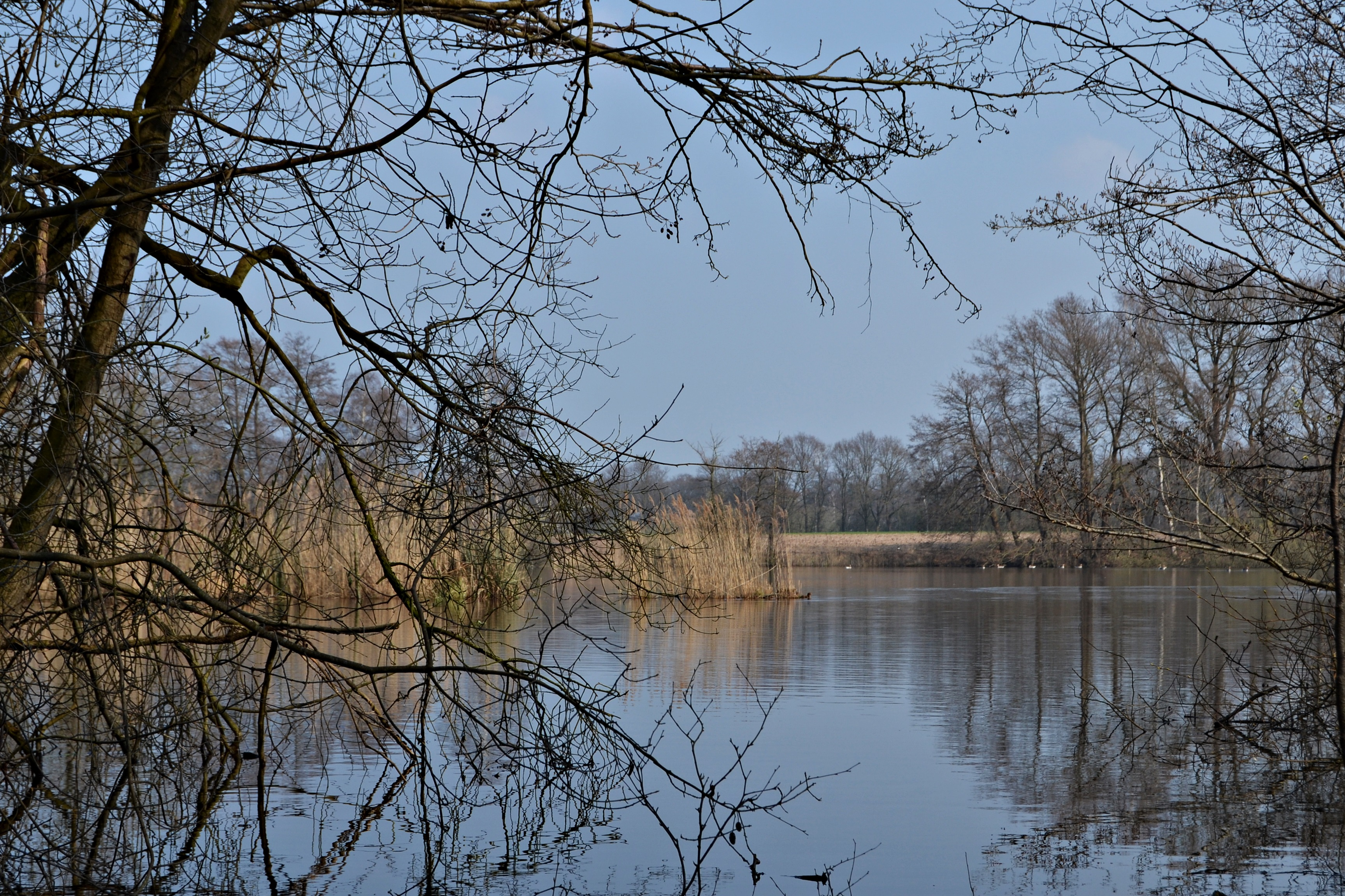 Naturschutzgebiet Darnsee in Bramsche (Landkreis Osnabrück)